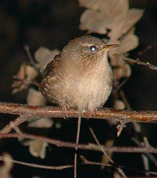 Gjerdesmett.